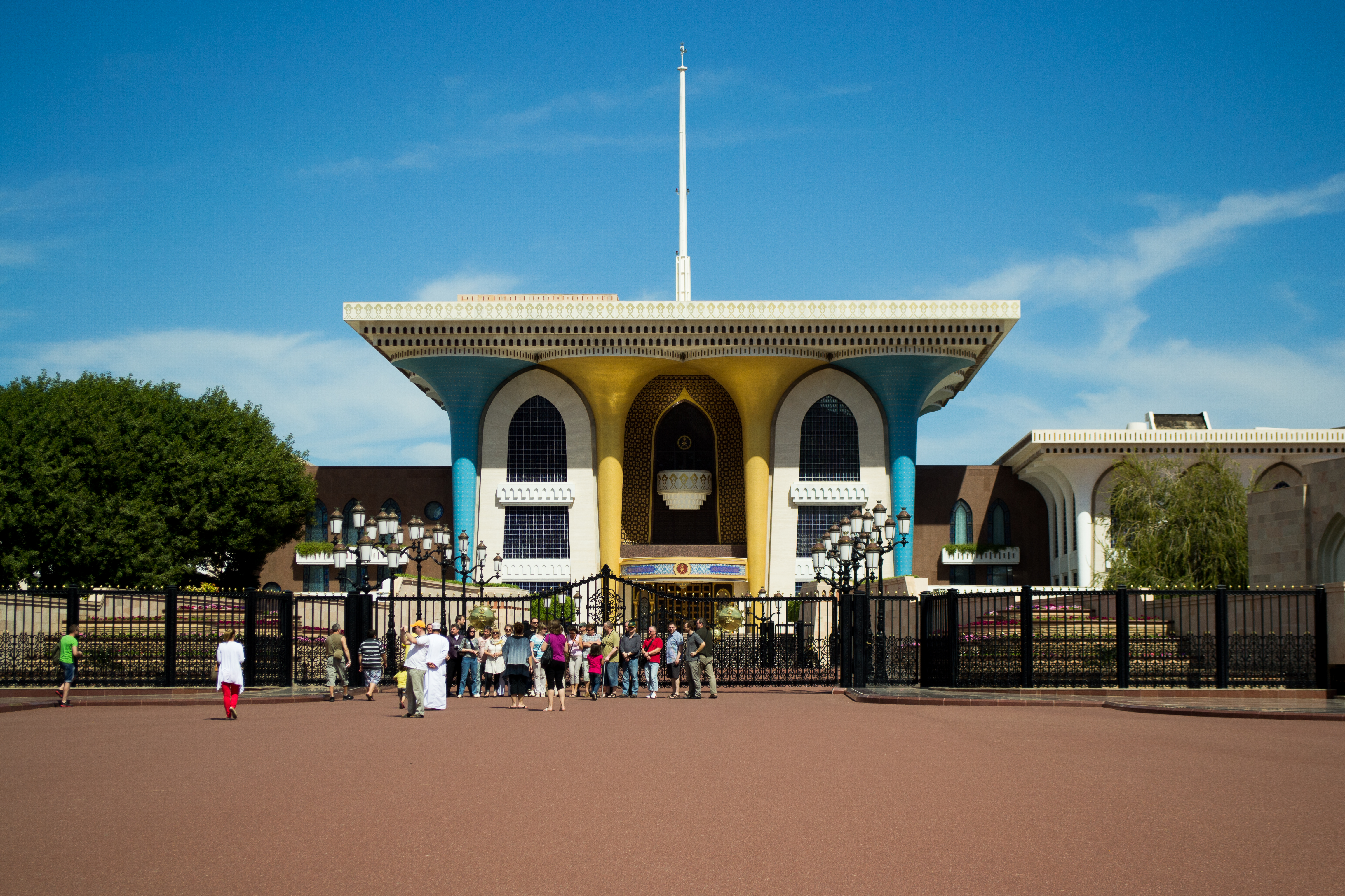 Oman2-011